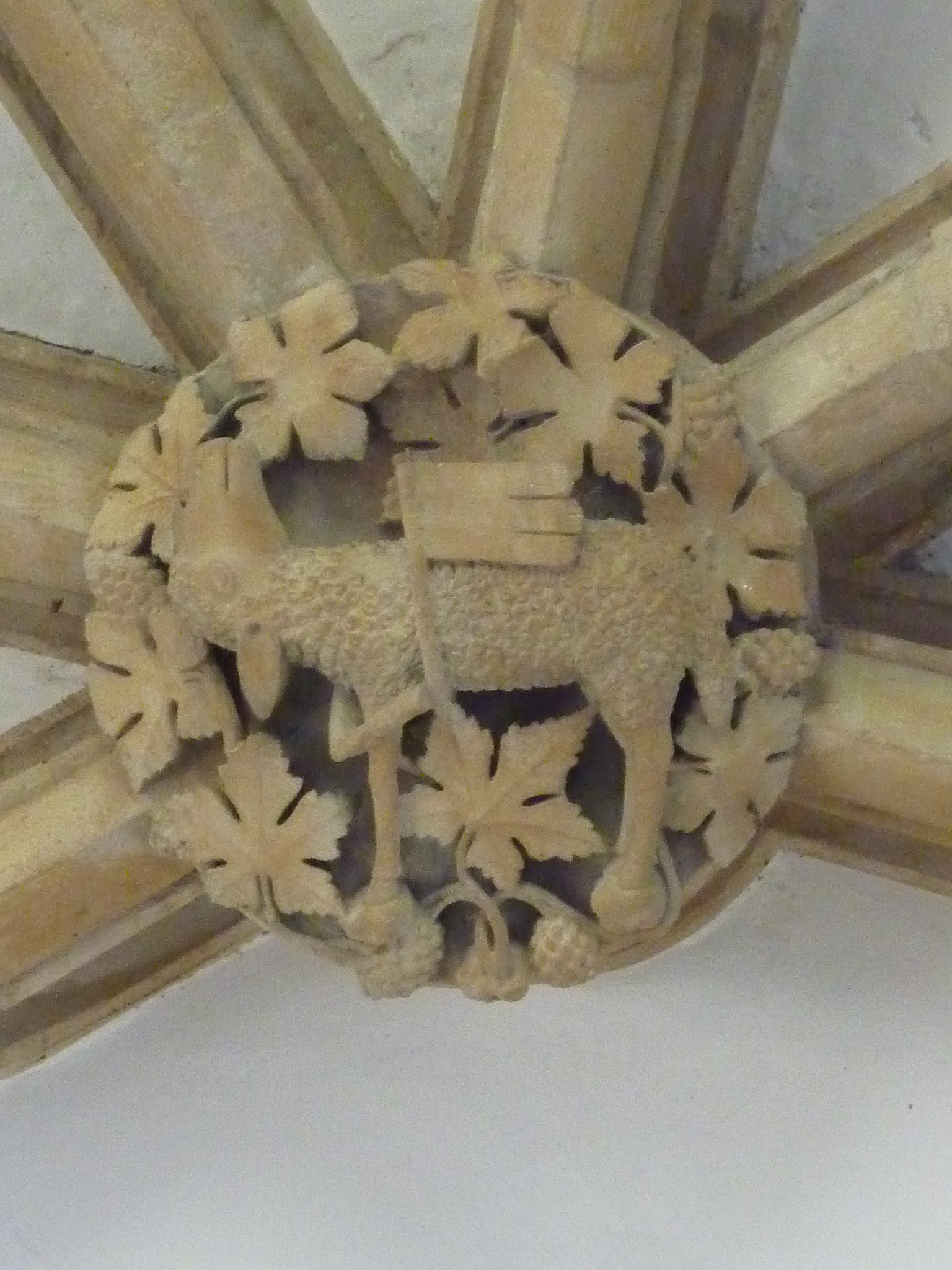 Kapelle, Hof Iben, Schlussstein des Chorgewölbes mit Agnus Dei